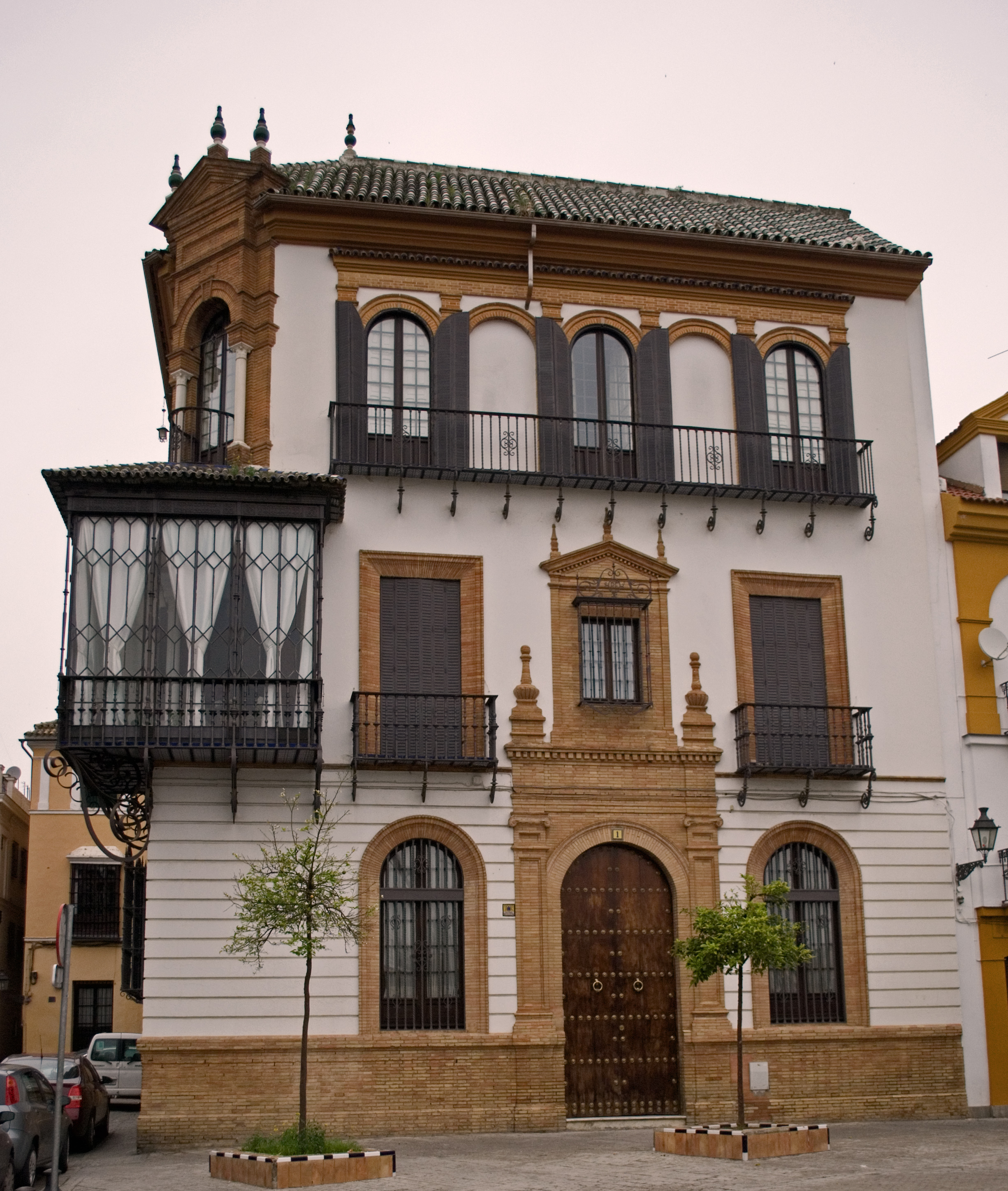 Edificio en plaza de refinadores esquina a calle Cano y Cueto, Sevilla. Arquitecto Aníbal González (1915-1919)